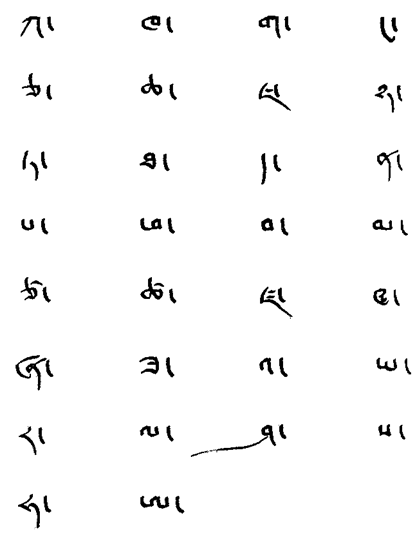 умэ шрифт (Umê script)